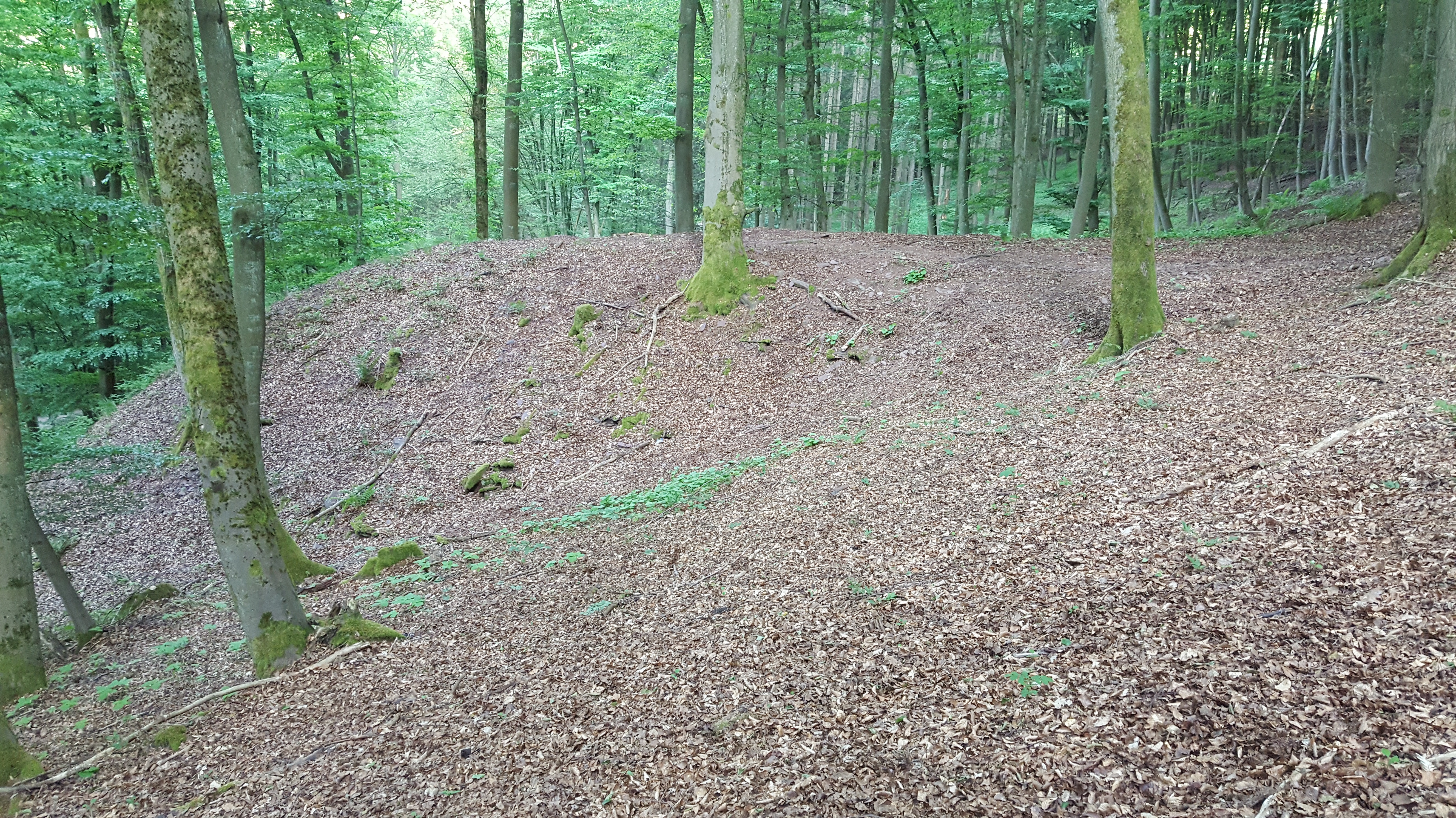 Halde der Grube Gewinn bei Haiger-Sechhelden